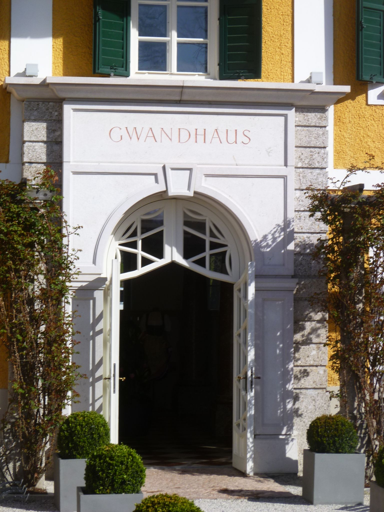 Rupertihof/Schlosshotel St. Rupert